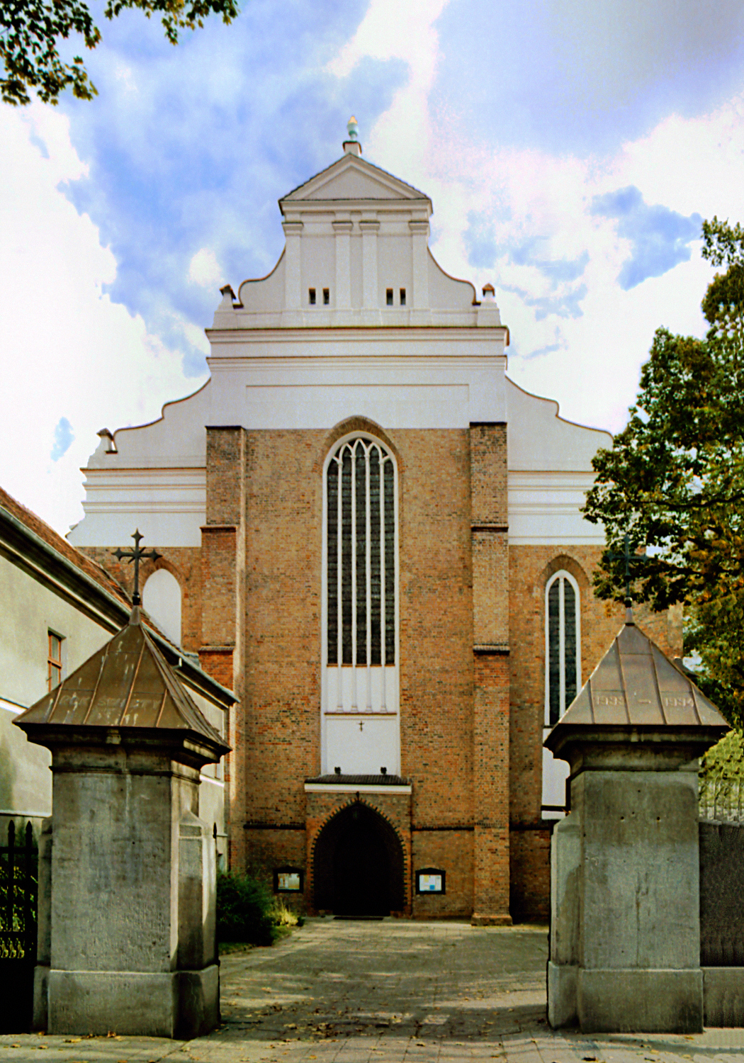 Poznań, kościół Bożego Ciała, widok od zach. (Poznań, Corpus Christi Church, view from west).